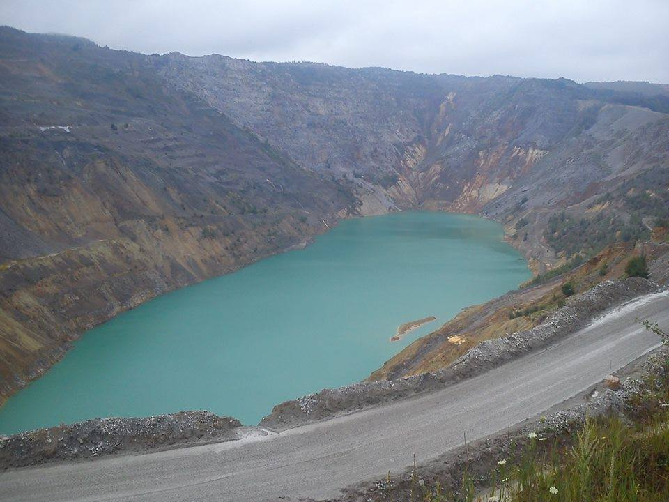 Српски (ћирилица): Површински коп „Јужни ревир“